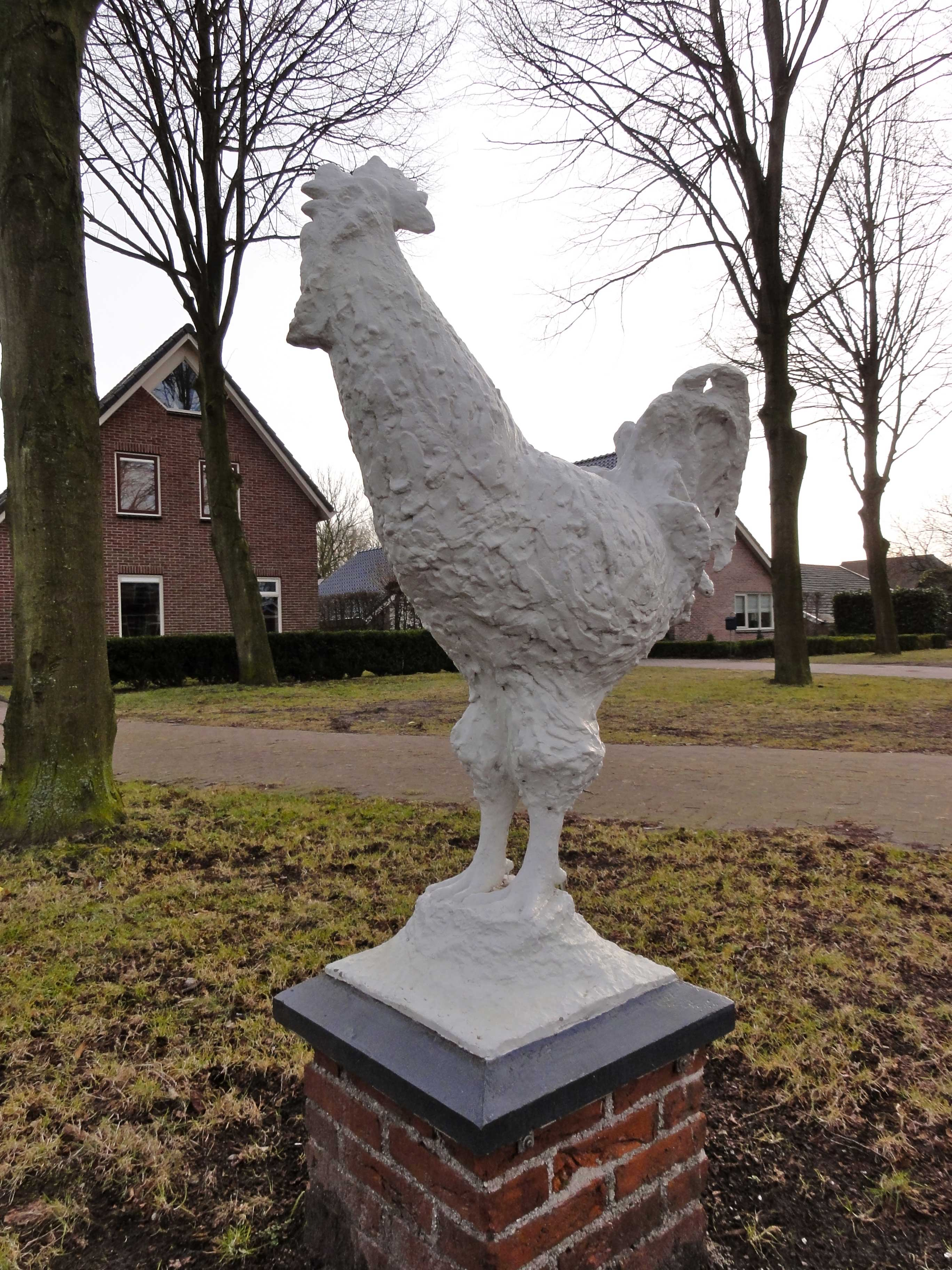 "Haan" door Jan Dekkers - Gieterveen